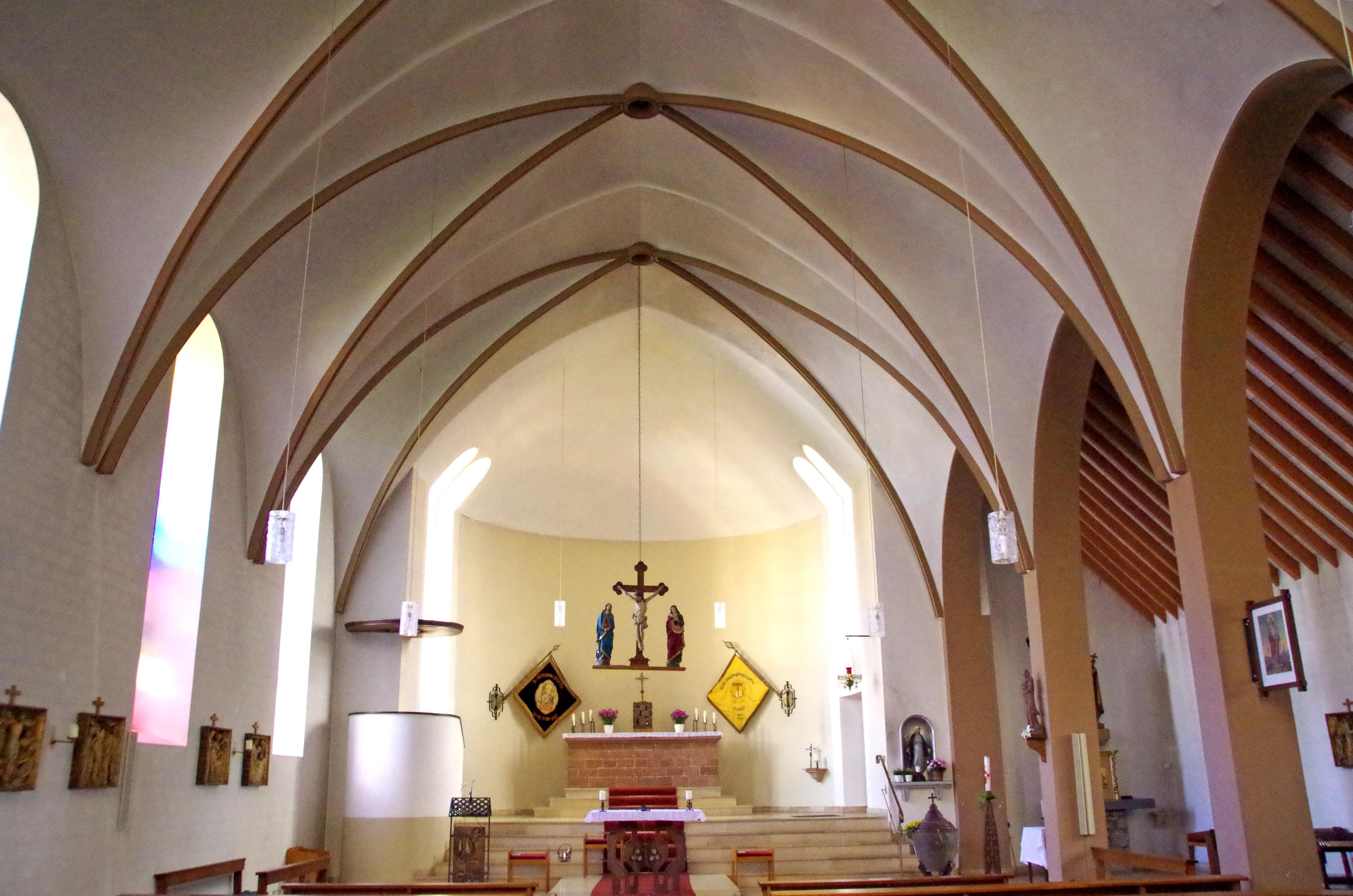 St. Barbara Krekel, Kirchenschiff